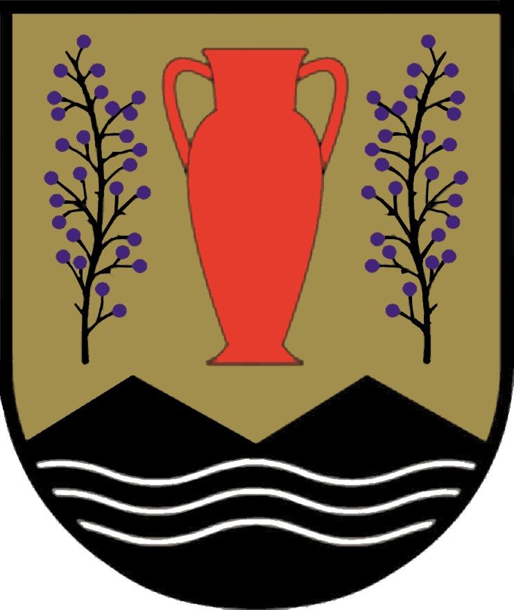 Wappen der Gemeinde Bad Gleichenberg